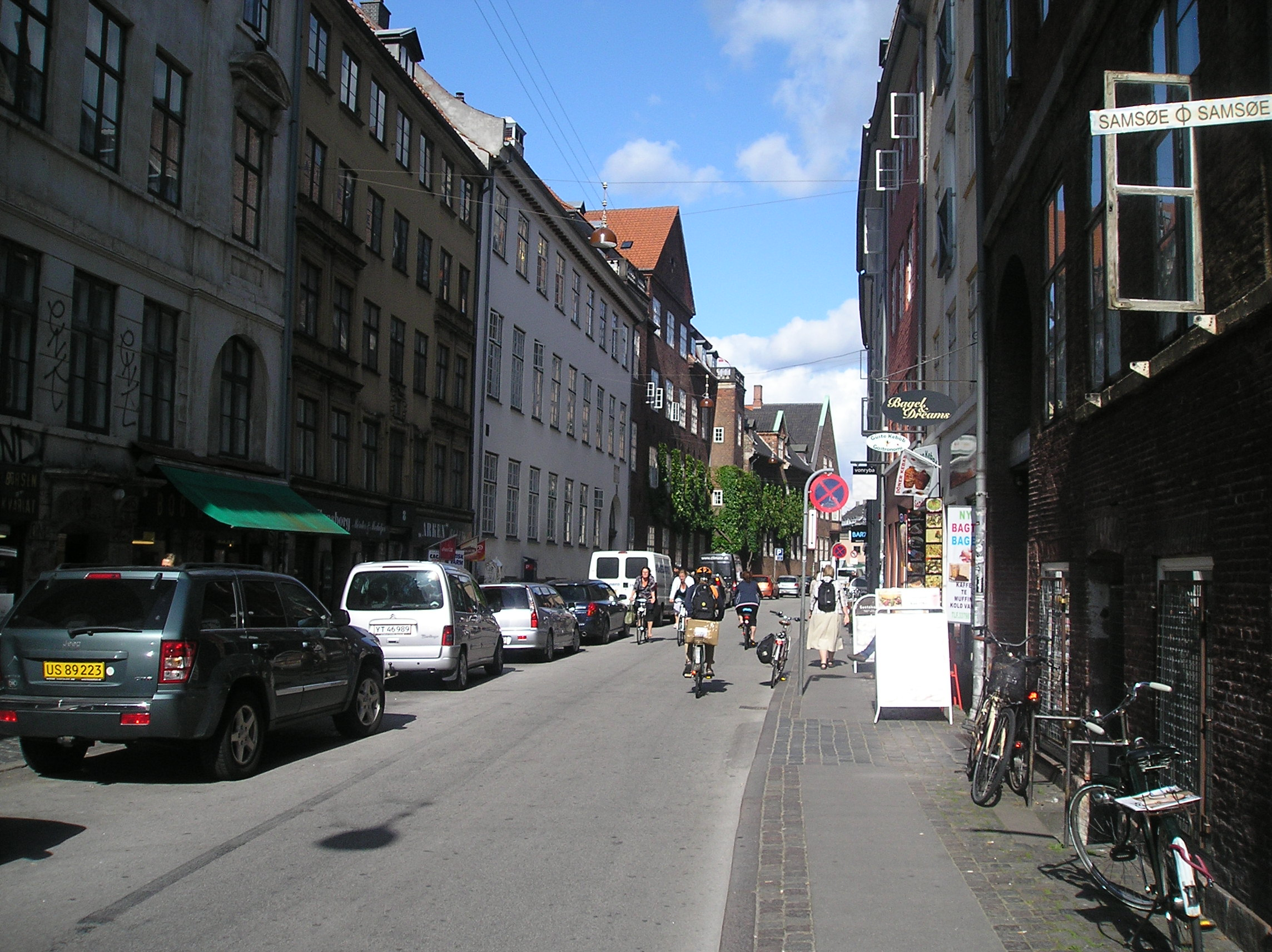 The street Studiestræde in Copenhagen.